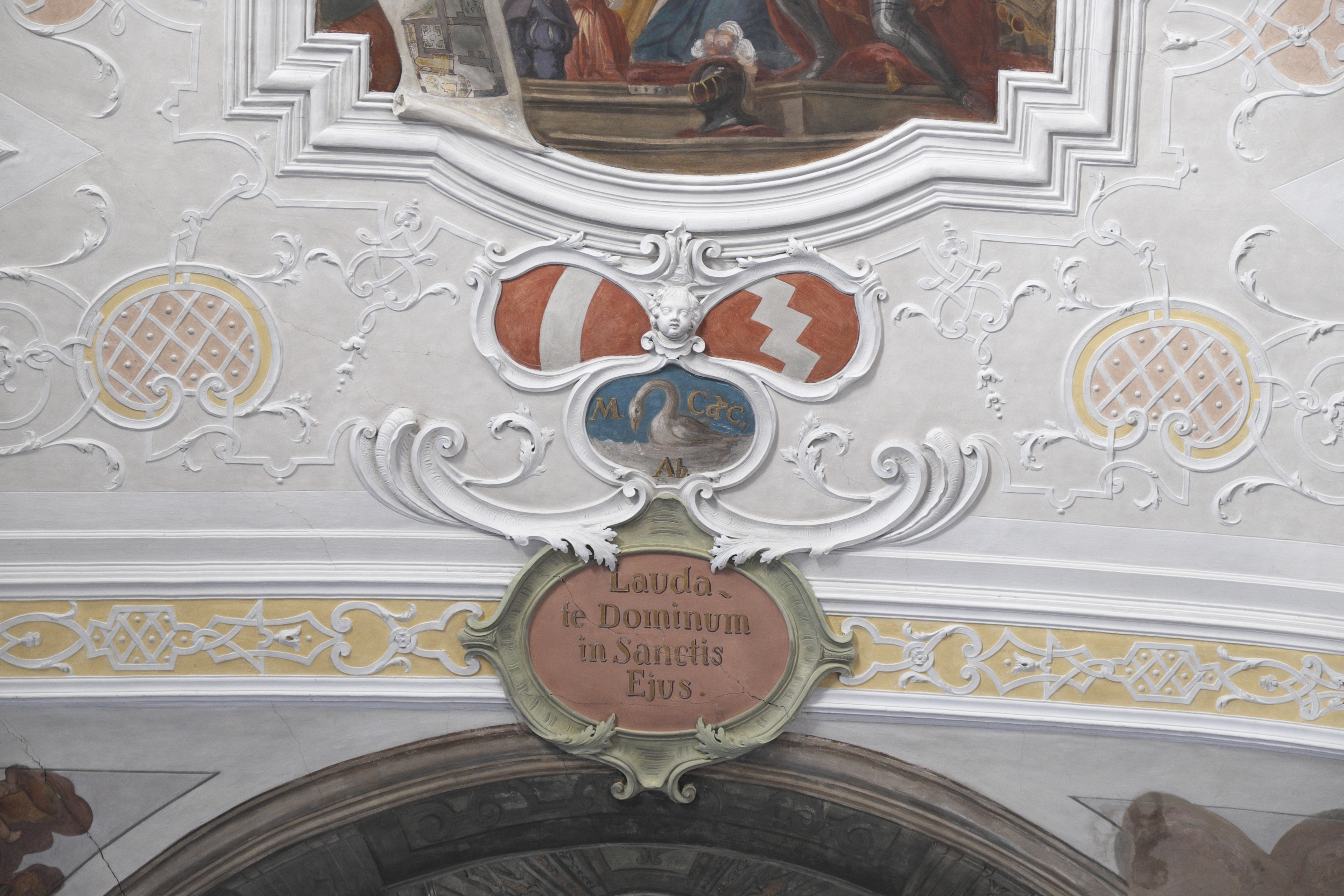 Katholische Pfarrkirche St. Emmeram, ehemalige Benediktinerinnen-Klosterkirche Mariä Himmelfahrt, in Geisenfeld im Landkreis Pfaffenhofen an der Ilm (Bayern/Deutschland), Deckenfresken und Stuckdekor im Langhaus von Melchior Buchner (Puchner, Büchner), von 1728; Stuckkartusche und Wappen